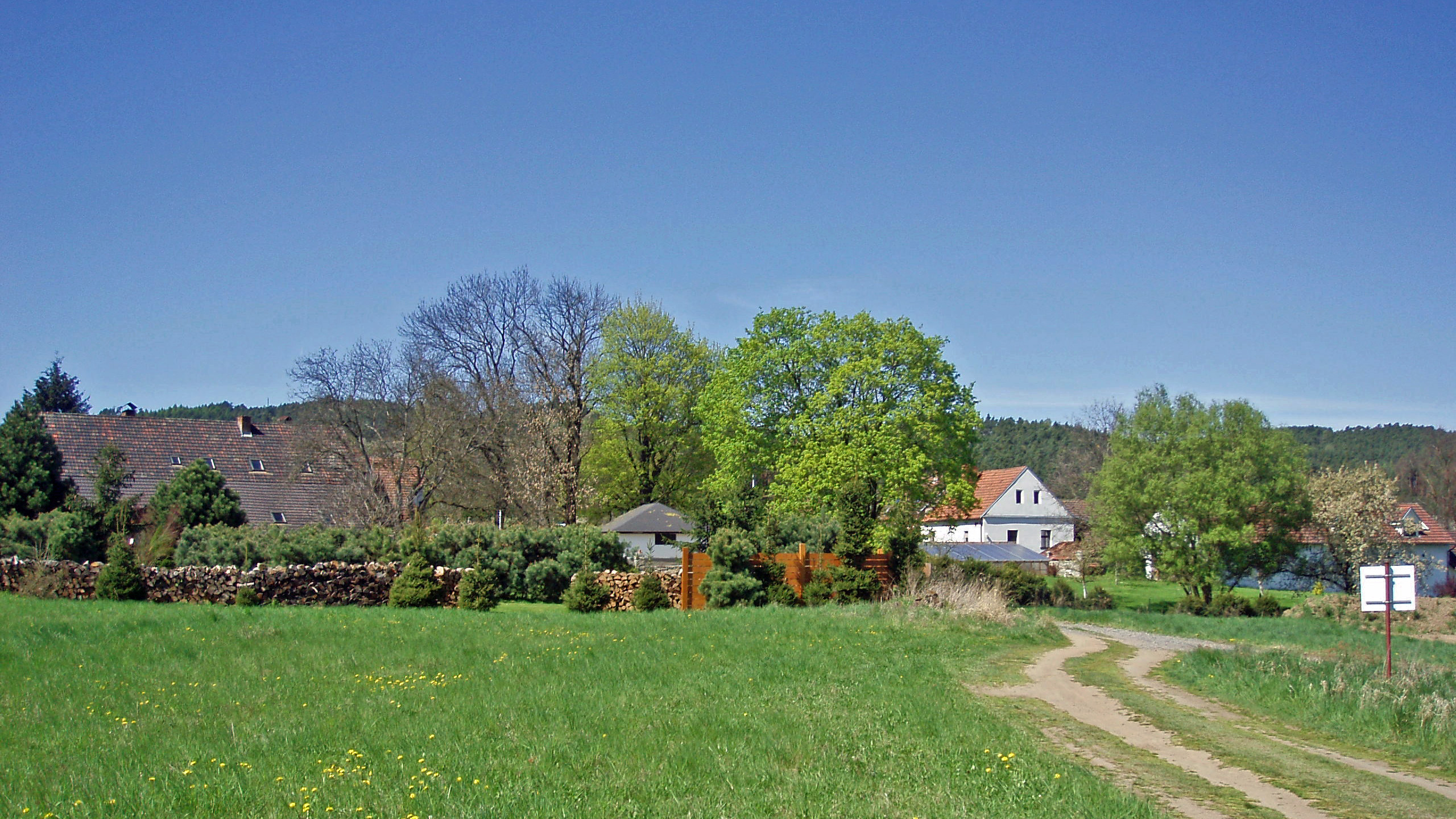 Žebrákov - osada u Vltavy v katastru obce Zduchovice